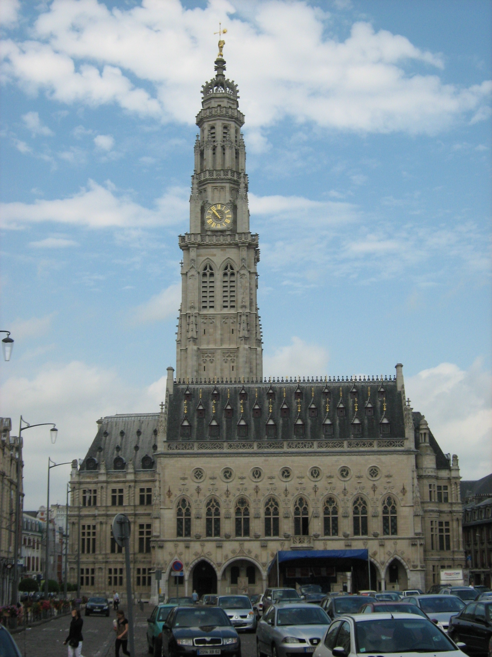 Беффруа в г. Аррас (Франция)